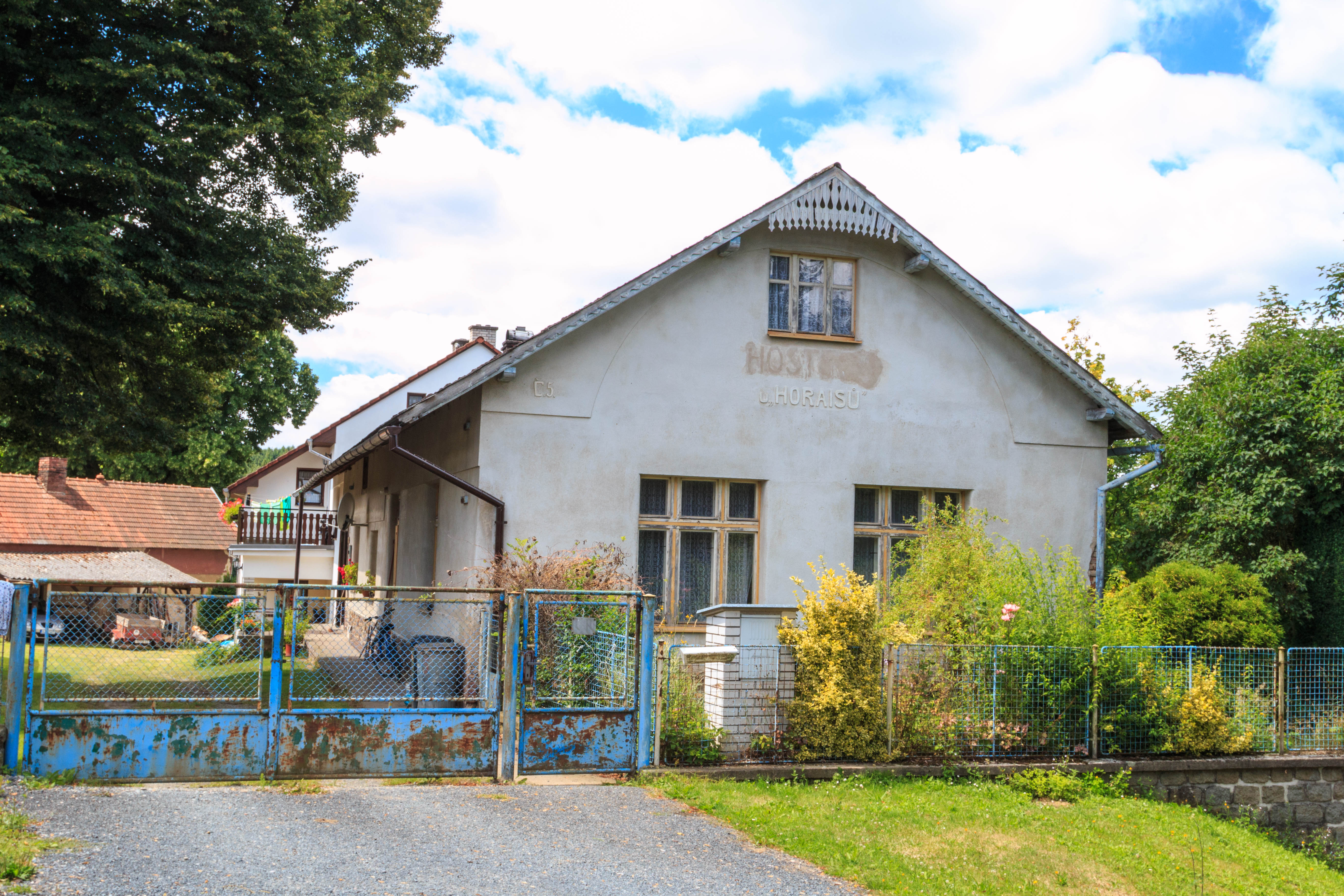 Hlohov čp. 5